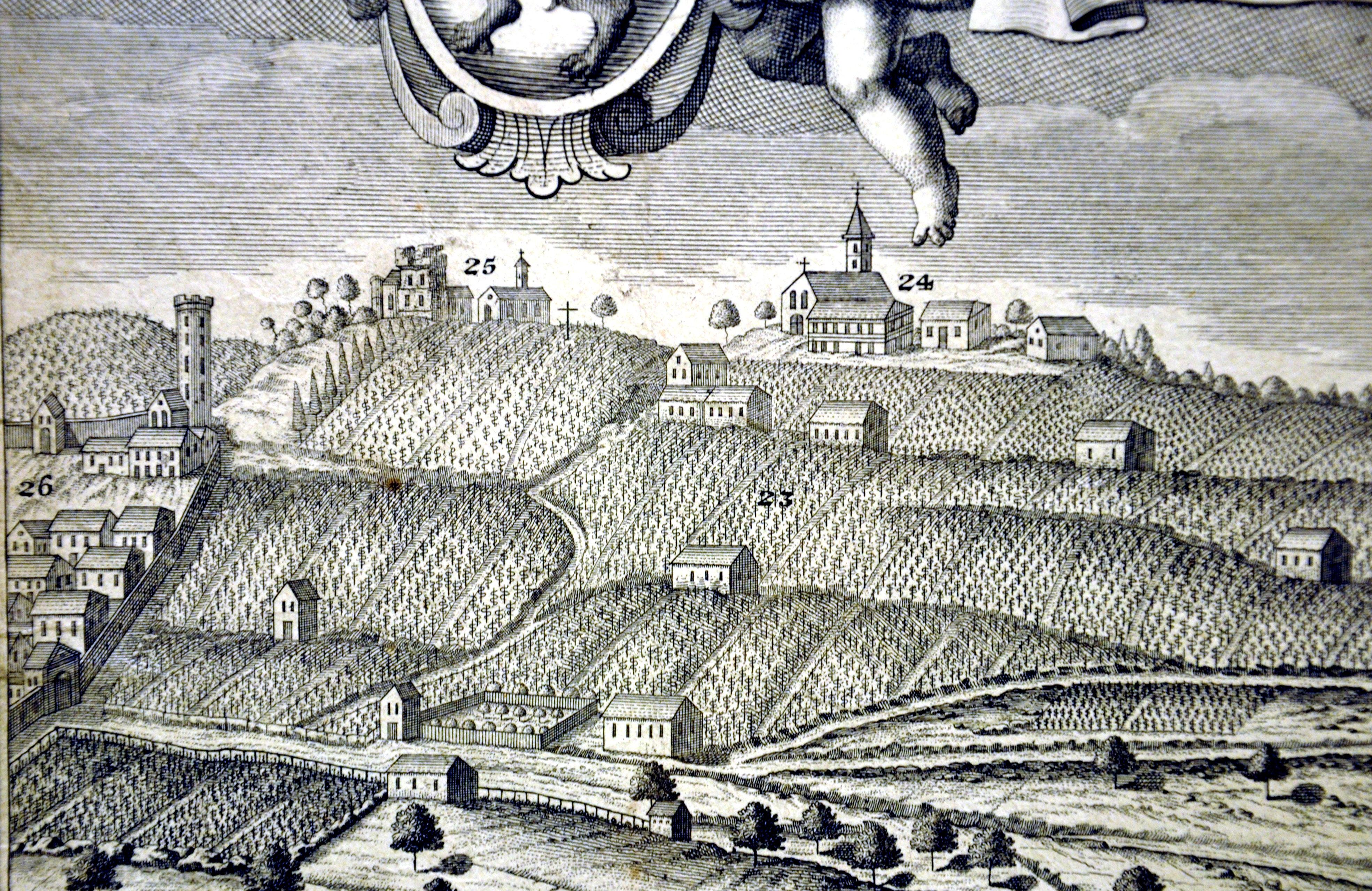 Kloster Weißenau (Stich von Johann Mathias Steidlin, 1734), Details (stilisierte Ansicht): 23. Weinberge mit Torkeln; 24. St. Christina; 25. Veitsburg; 26. Ravensburg mit Mehlsack